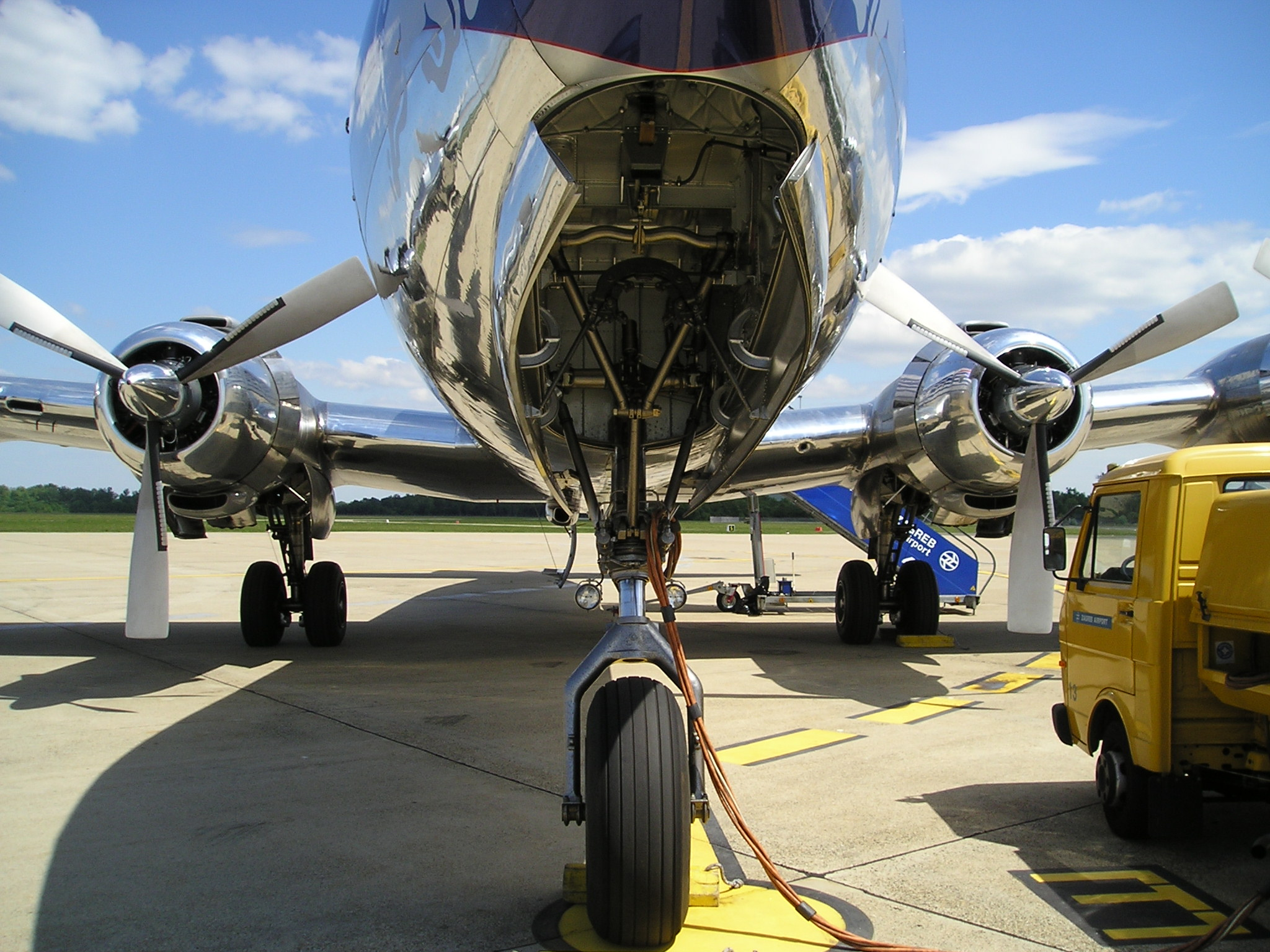 DC-6B nose landing gear